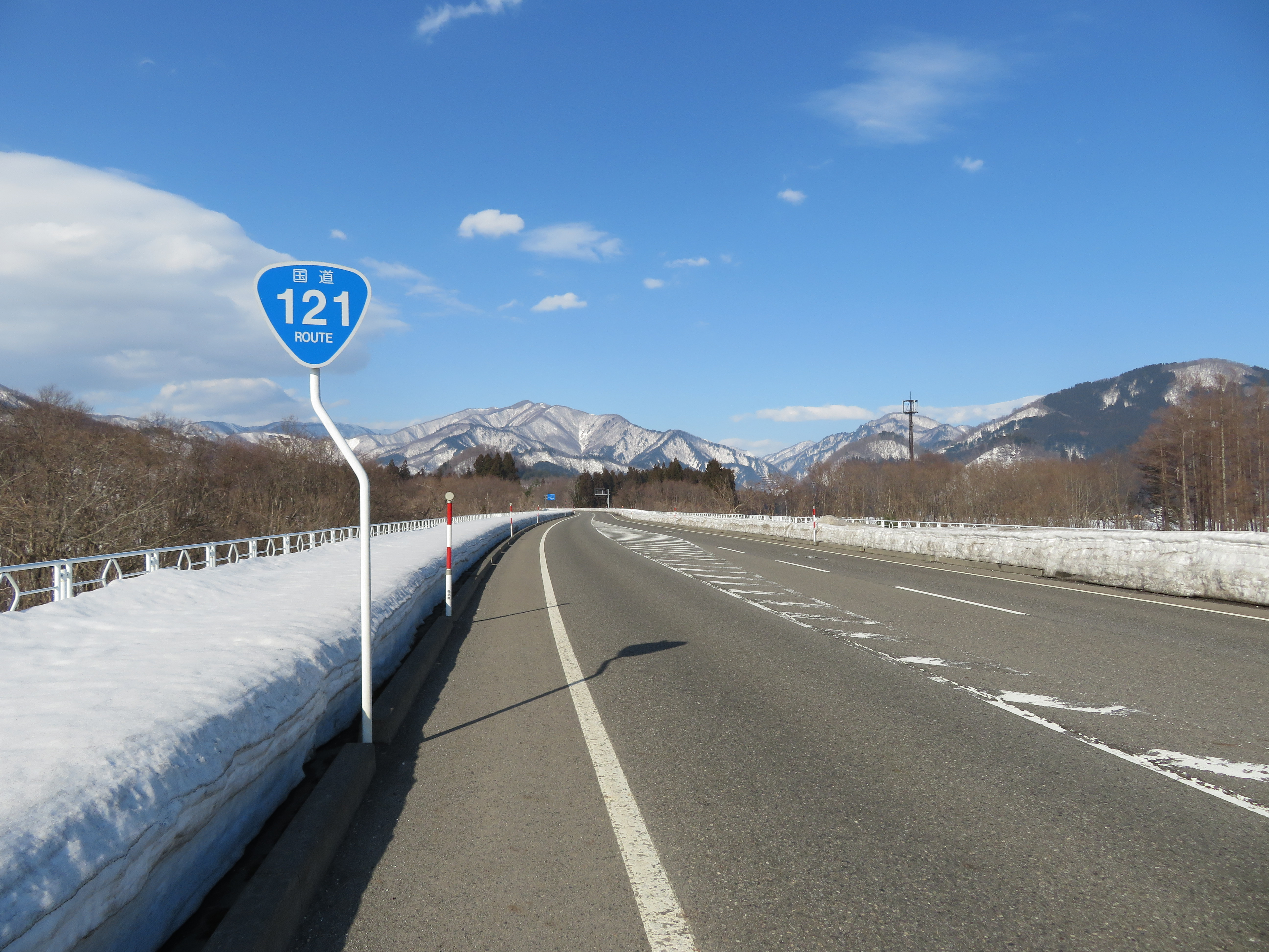 国道121号線 大峠道路 福島県喜多方市熱塩加納町米岡下平乙付近（大峠トンネル方面を撮影） Canon PowerShot SX720 HS